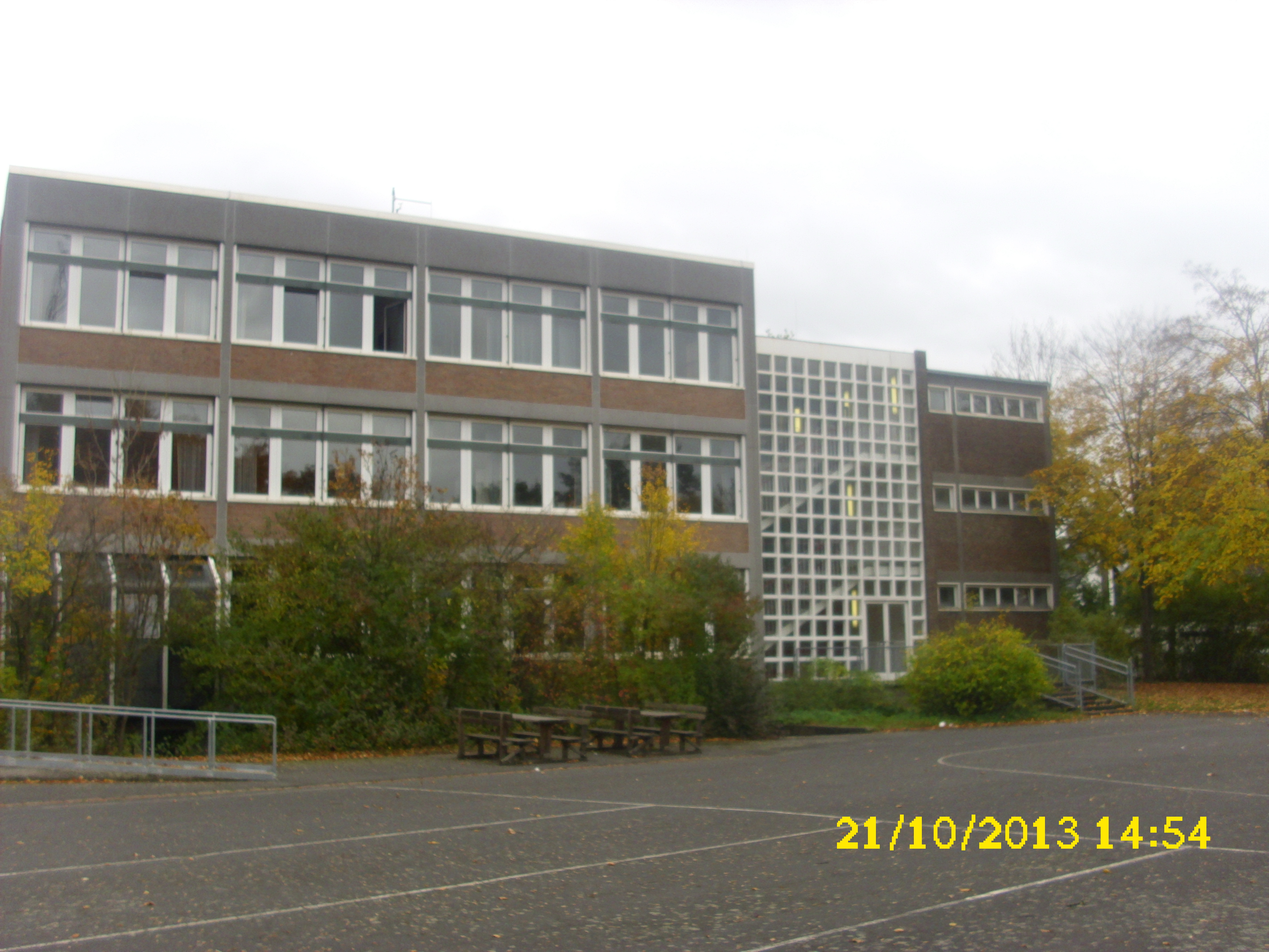 Teil der Hauptstelle (Sicht vom Schulhof)